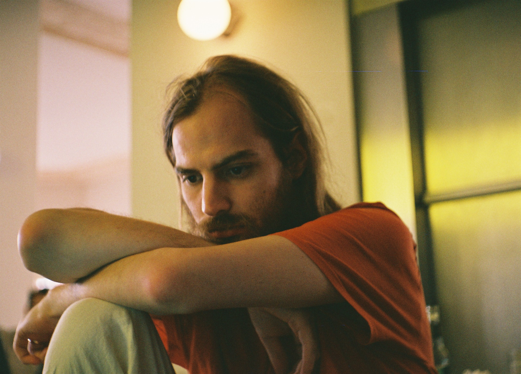 Michael